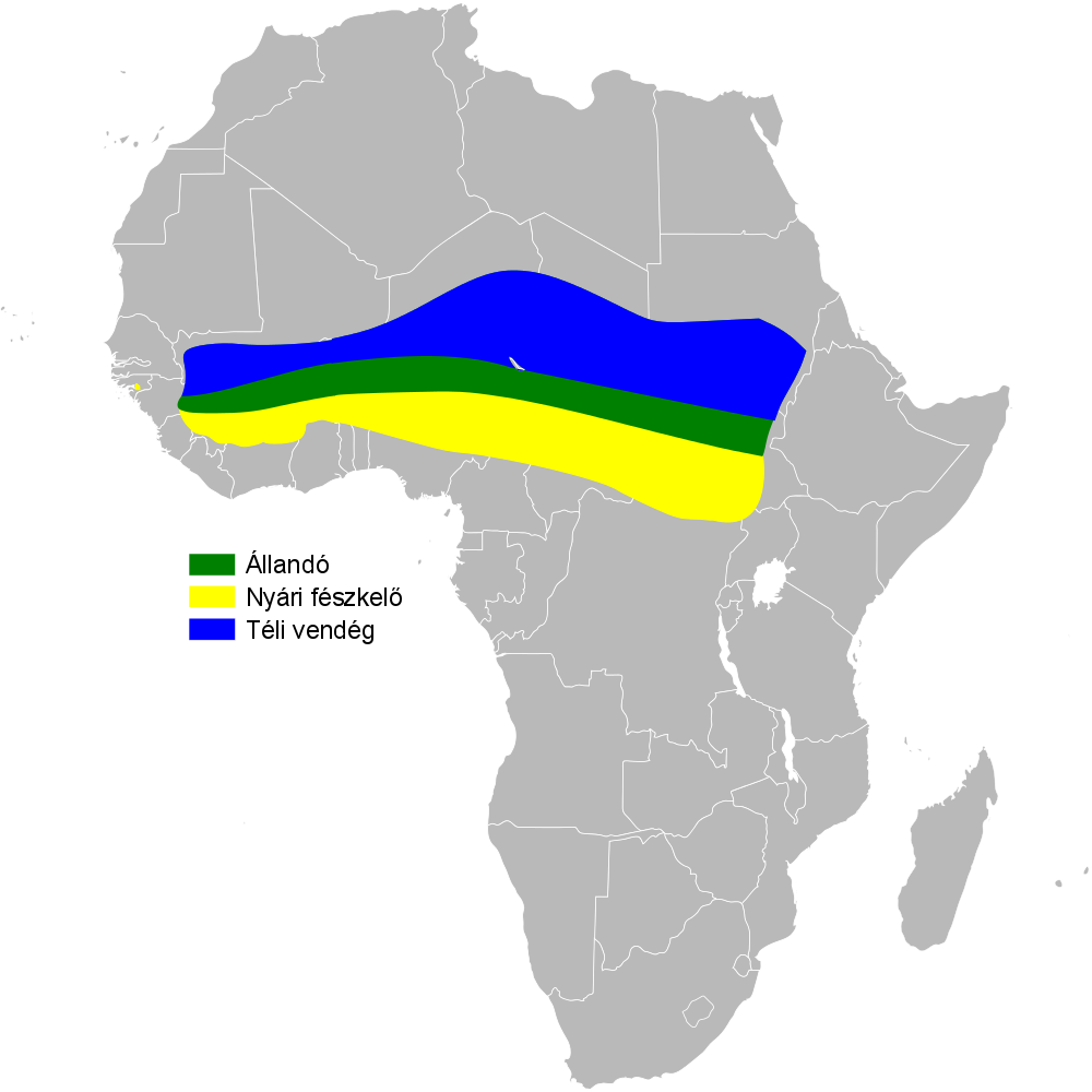 Pinarocorys erythropygia distribution map, based on